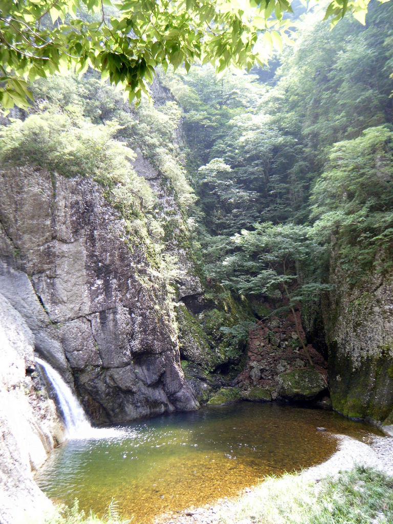 waterfall